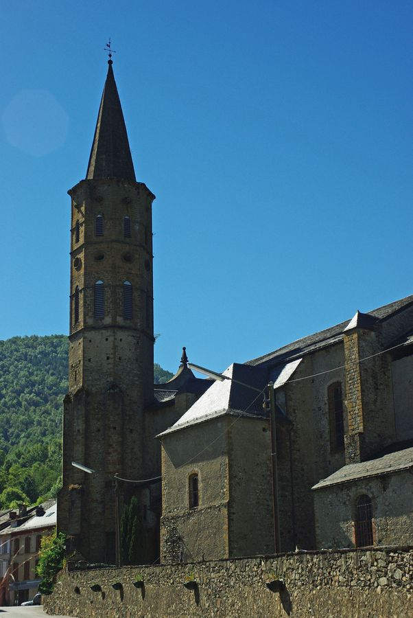 Église de la Nativité-de-la-Vierge de Massat (Inscrit) .